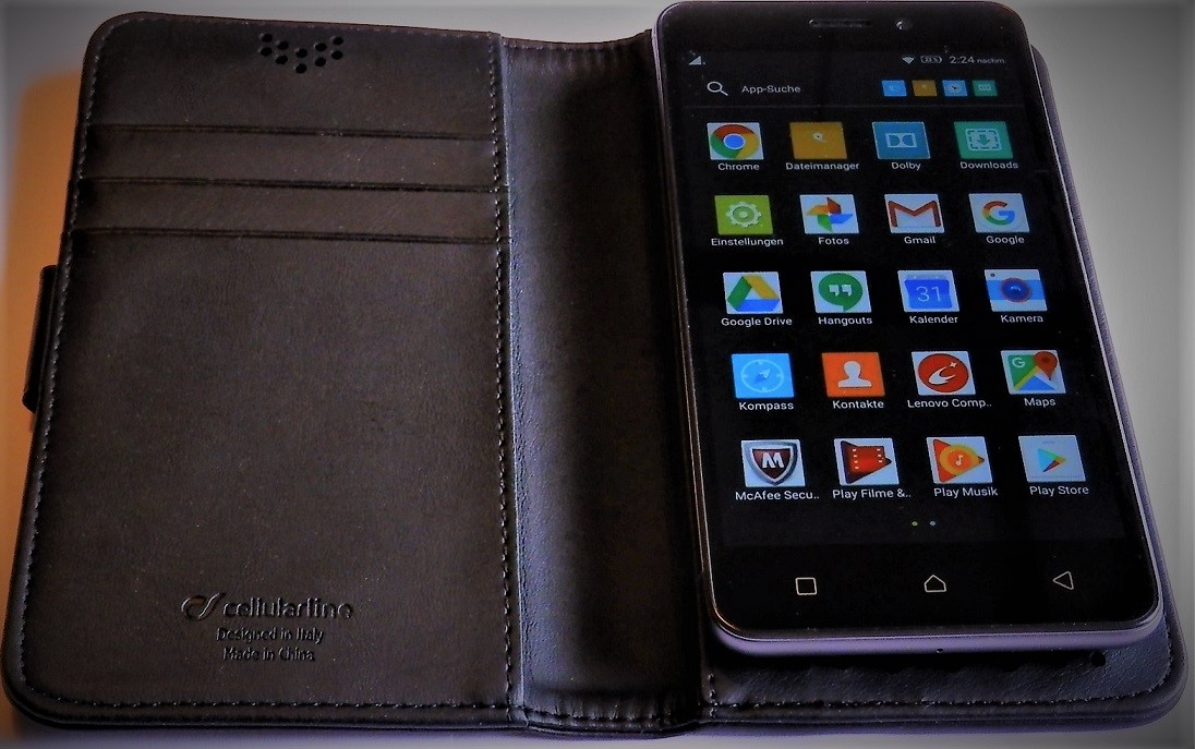 Lenovo K6_2017 Smartphone; Smartphone des Herstellers Lenovo (Metallgehäuse, Fingerprint-Sensor, Octacor-Prozessor)